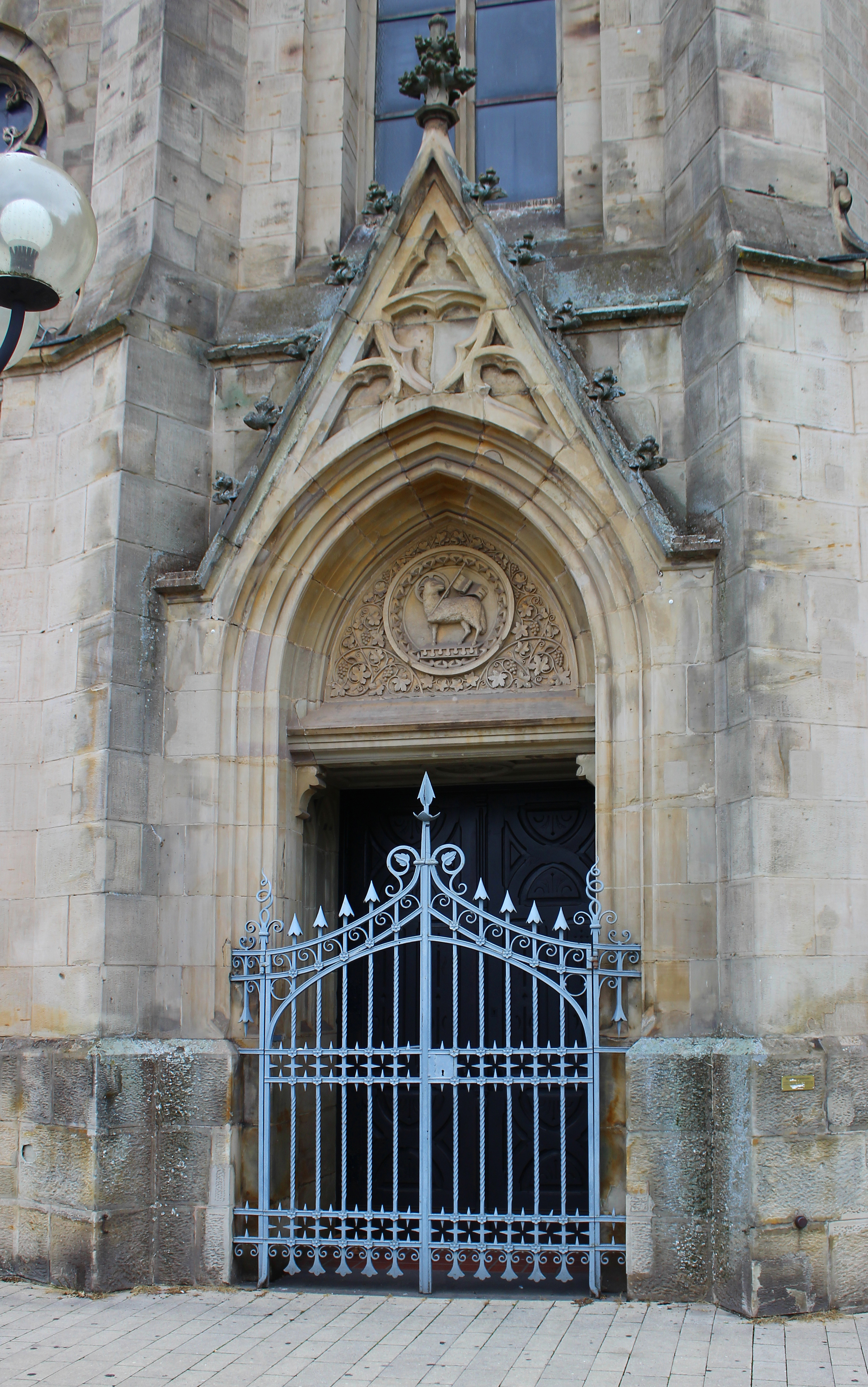 Portal der katholischen Pfarrkirche St. Ludwig in Saarlouis, Saarland